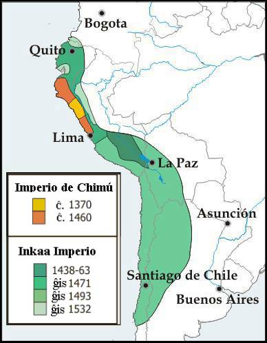 el la germana/tralaborita Originala fonto: :de:Bild:Inkareich.png.